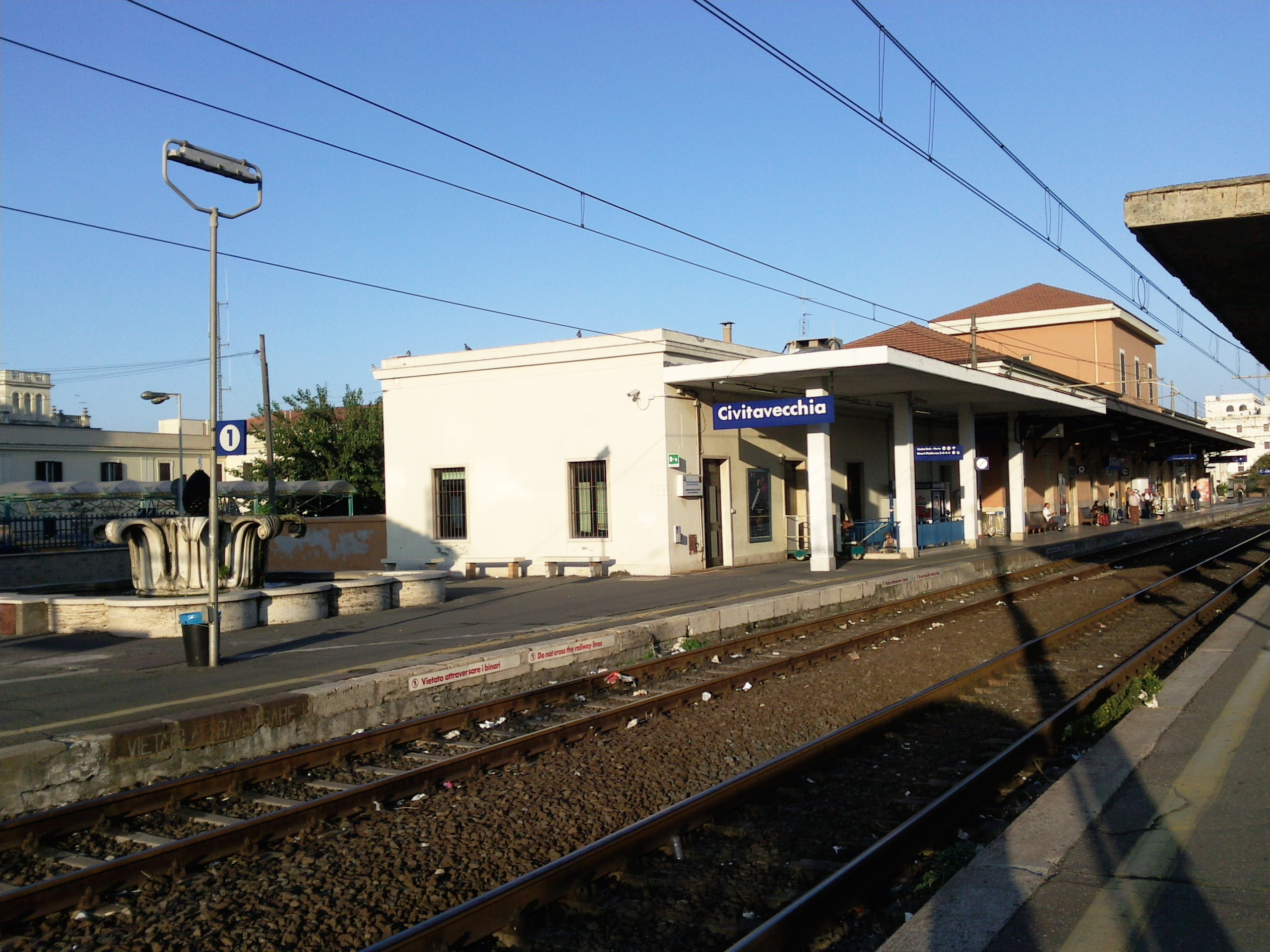 Lato binari della stazione di Civitavecchia.